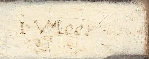 Vermeer La Ruelle detail signature